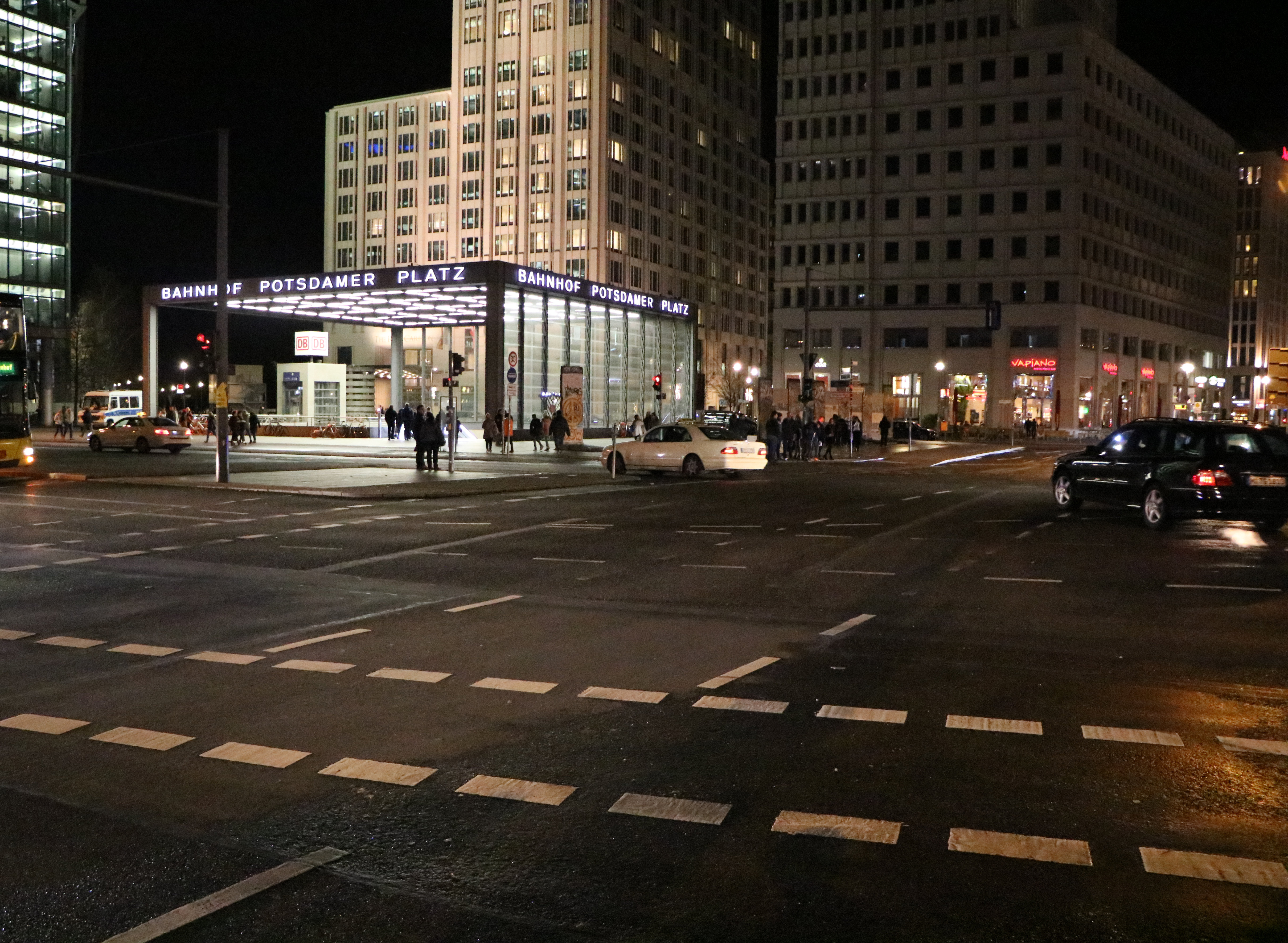 Dieses Bild zeigt den Bahnhof Potsdamer Platz bei Nacht.